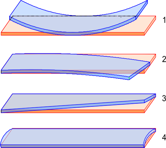 fouten in timmerhout